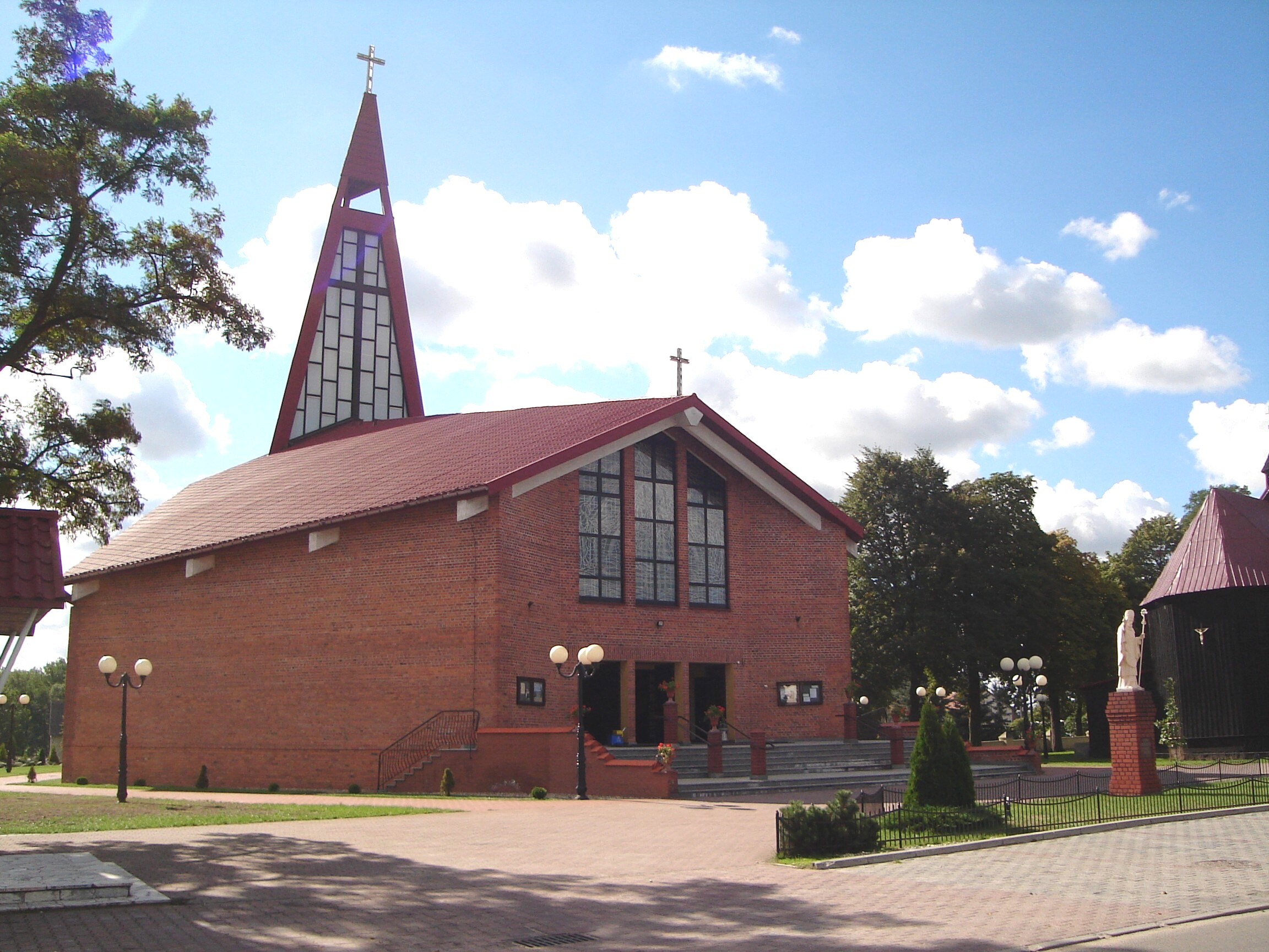 Kościół parafialny w Malanowie